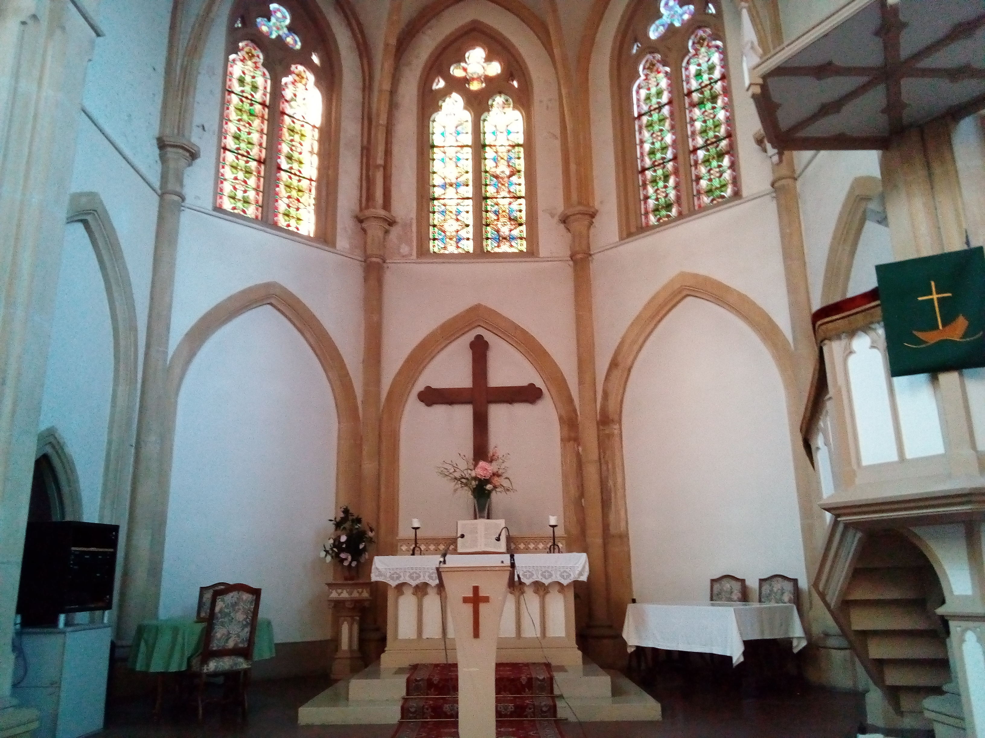 Chœur